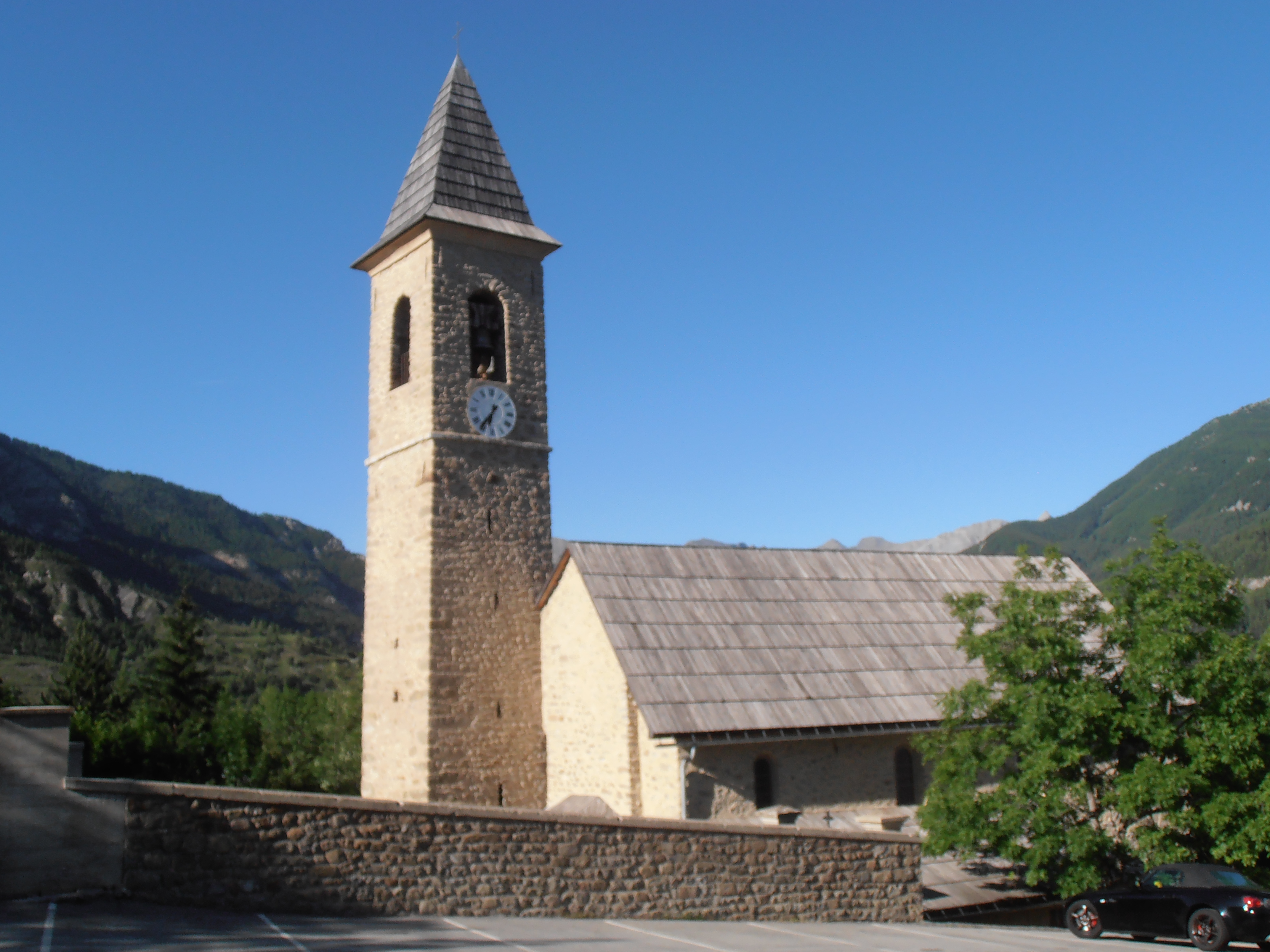 Villars-Colmars (Alpes-de-Haute-Provence), église paroissiale